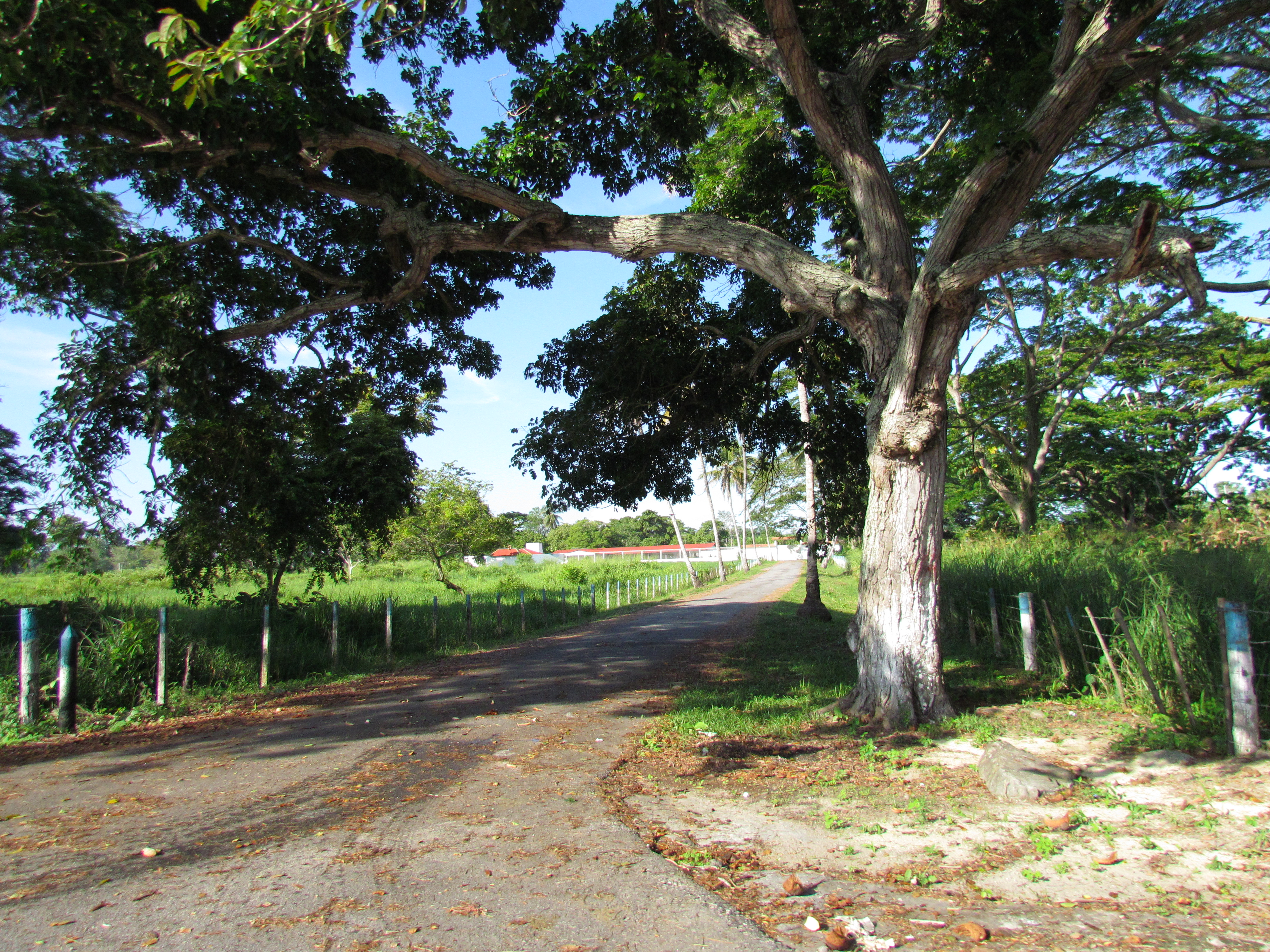 Entrada a la antigua Finca de Manuel Rosales, Monte Verde, Venezuela